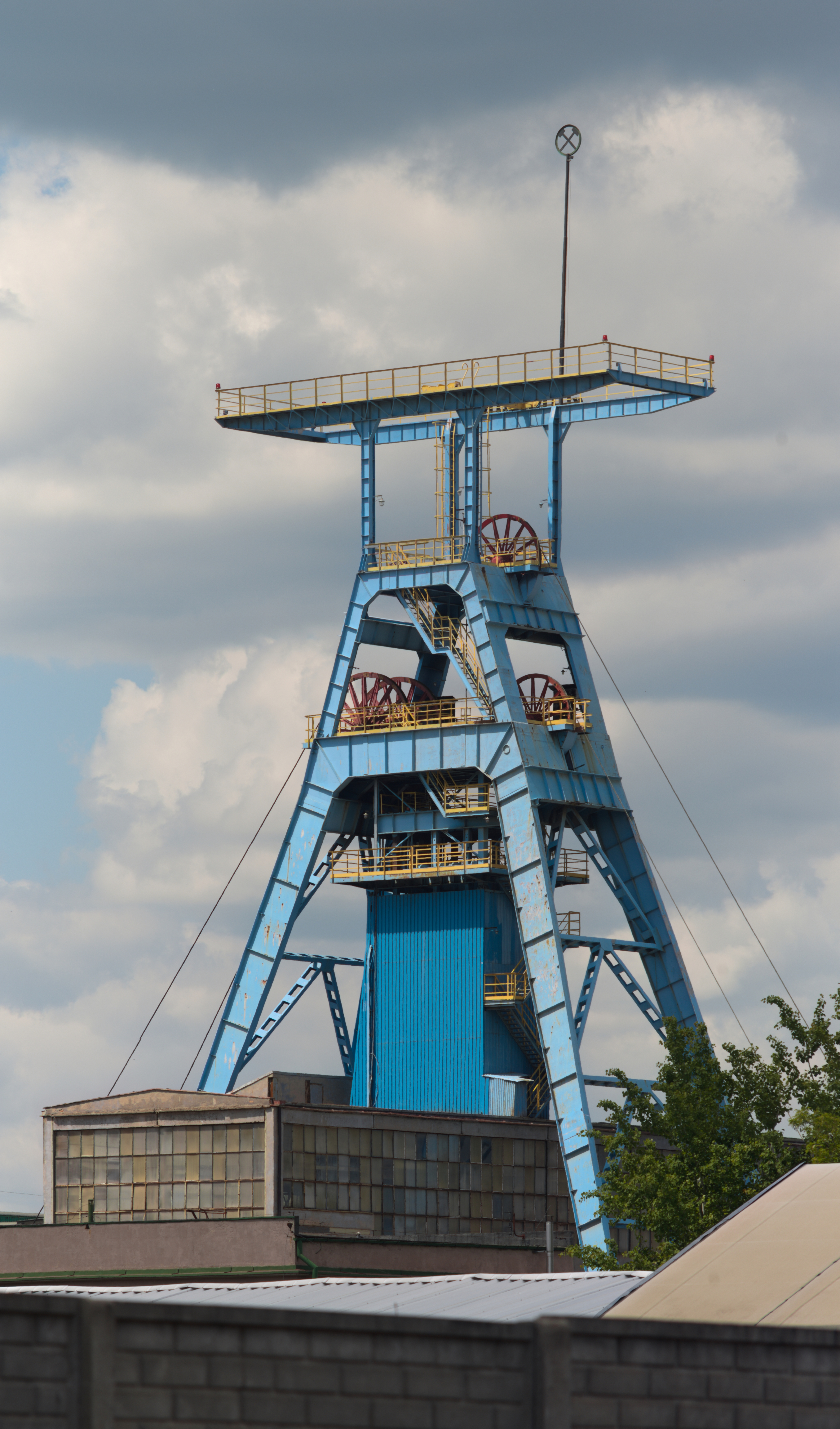 kopalnia Olkusz-Pomorzany, wieża wyciągowa szybu Chrobry przy ul. Wspólnej (zdjęcie złączone z 5 fotografii)